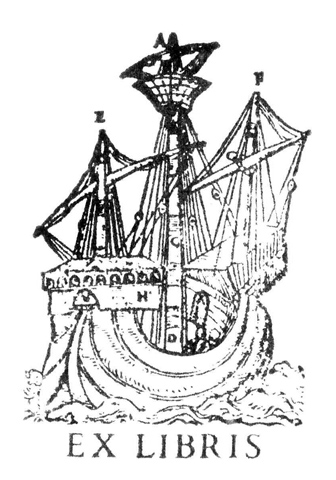 ex libris XXe siècle